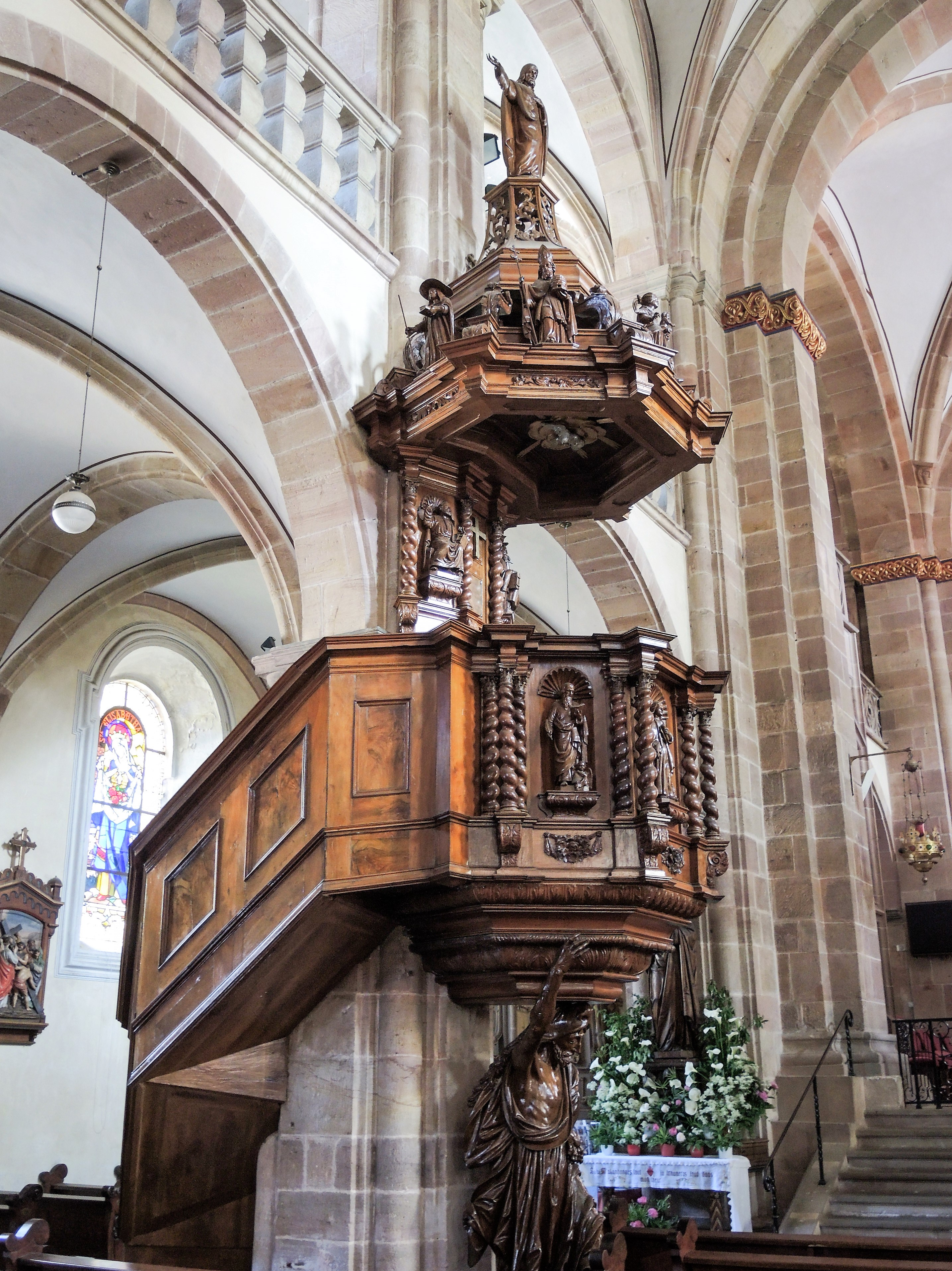 Chaire de l'église d'Andlau. Bas-Rhin